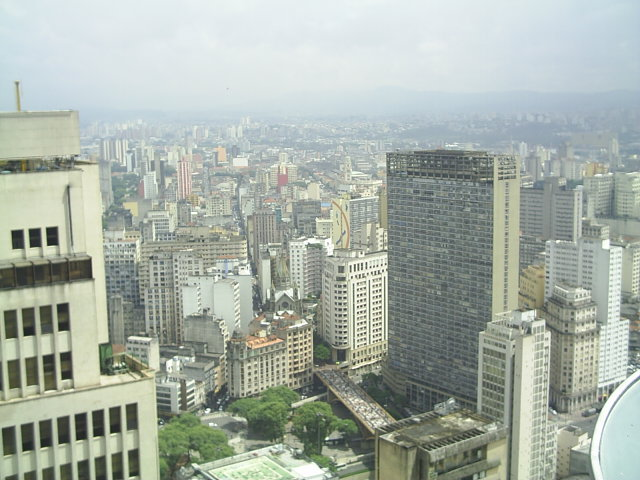 Mirante do Vale visto da Torre do Banespa.